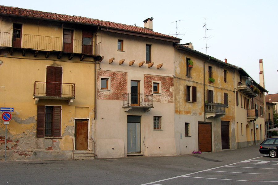 Edifici perimetrali del castello di Vespolate lungo il lato esterno sud-occidentale